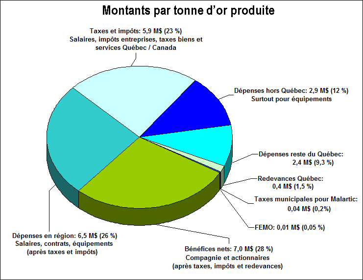 Montants par tonne d’or produite pour le Projet Osisko